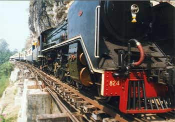 รถจักรไอน้ำแปซิฟิกหมายเลข 824 เมื่อคราวไปเยือนทางรถไฟสายมรณะ, จังหวัดกาญจนบุรี